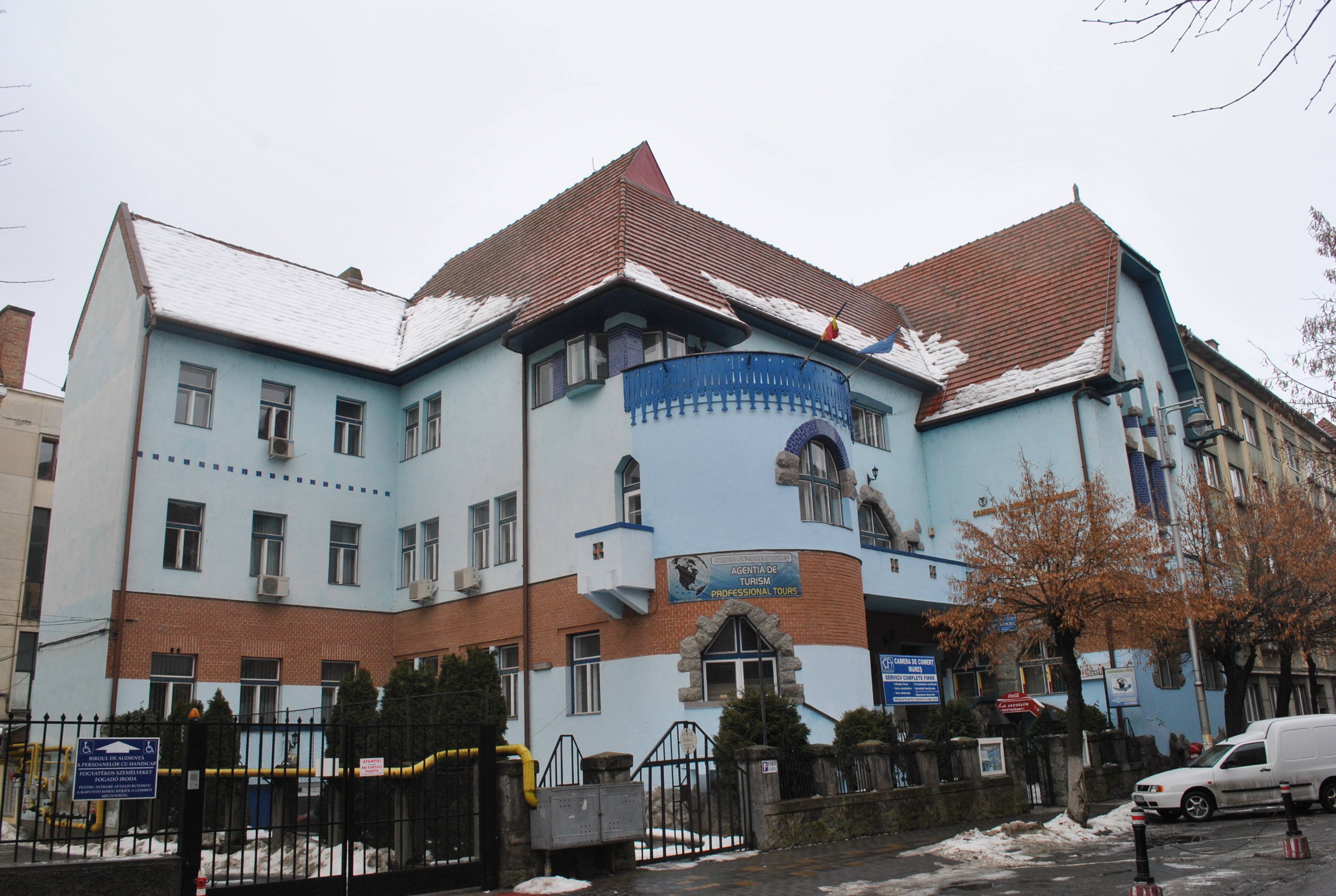 Camera de Industrie și Comerț, 1910 - 1912